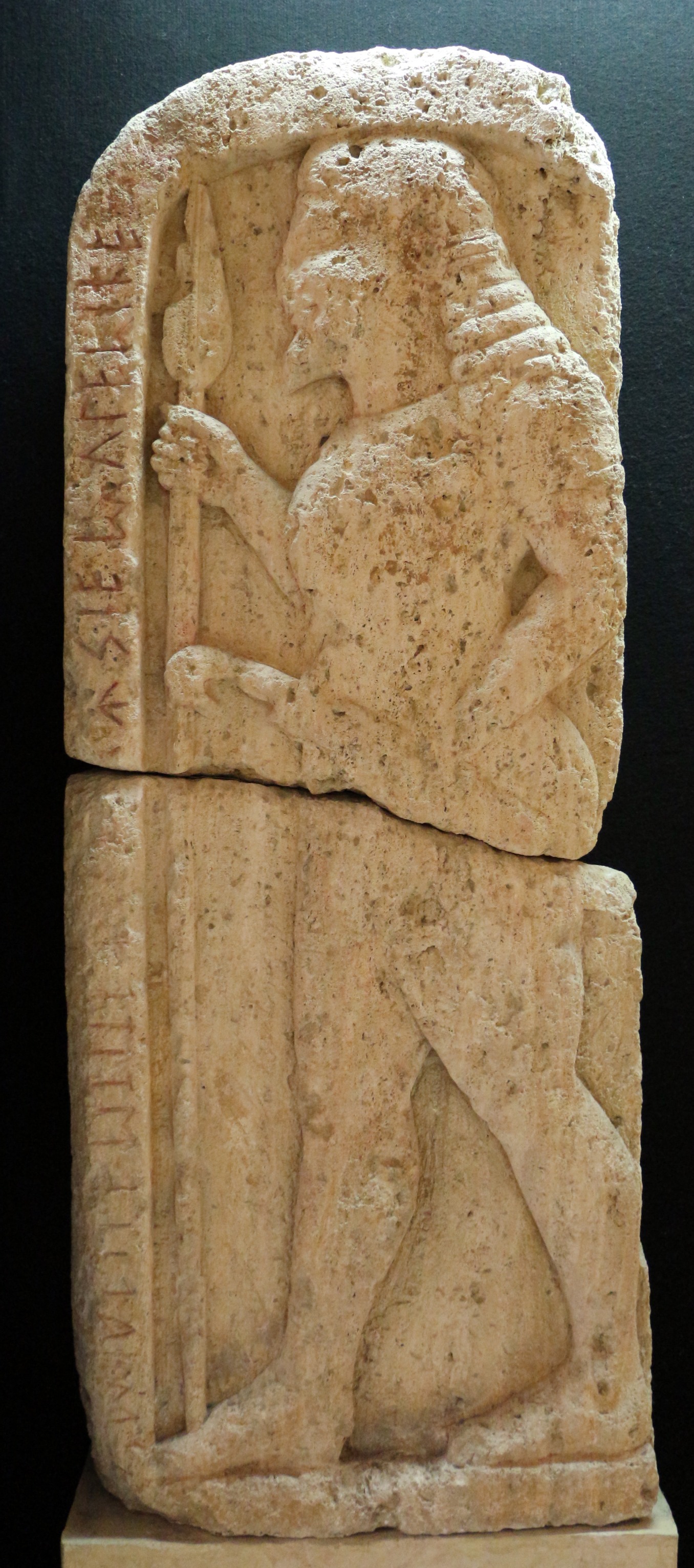 Etruscan antiquities in the Museo Guarnacci This is a photo of a monument which is part of cultural heritage of Italy.